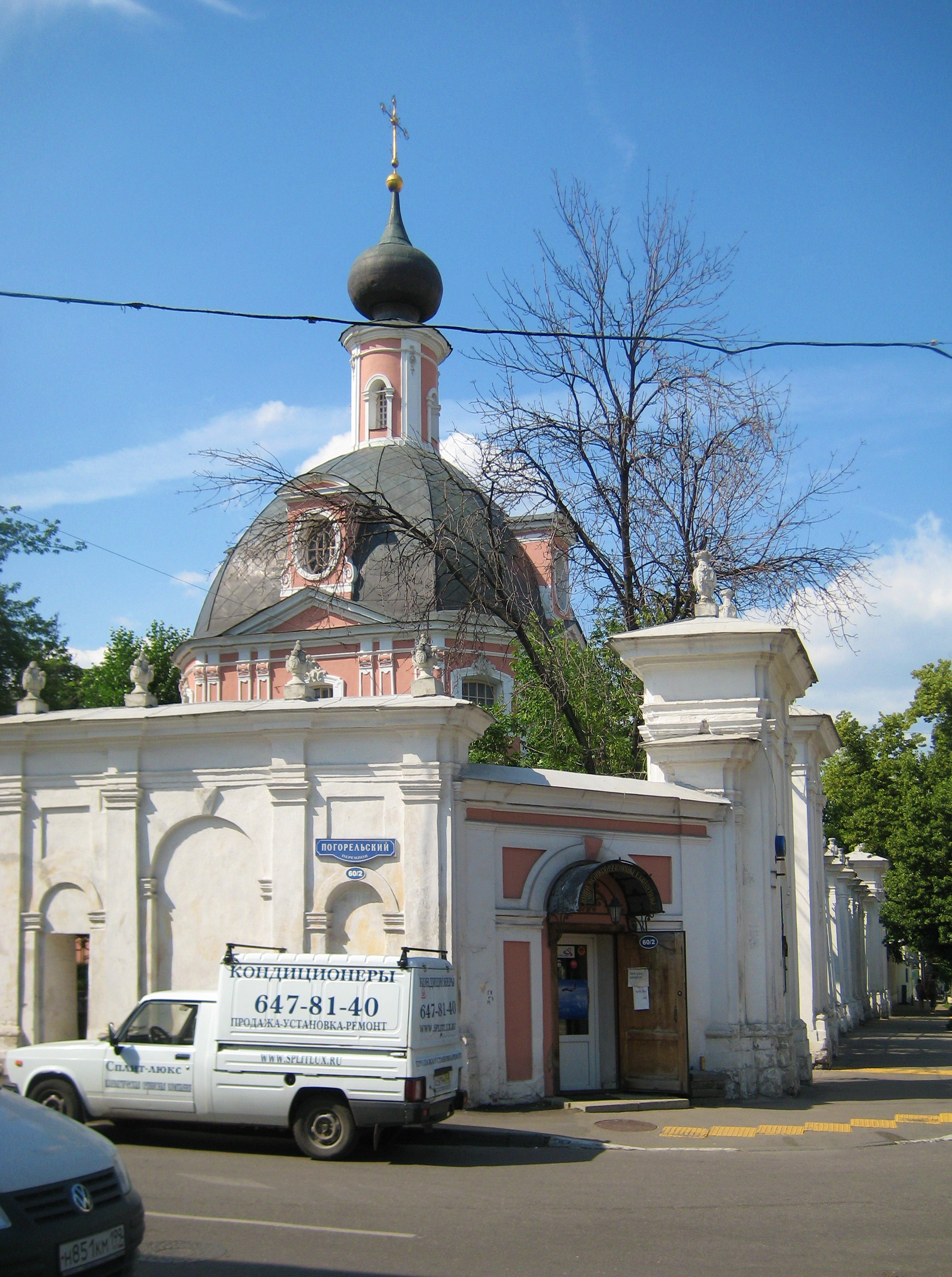 Большая Ордынка